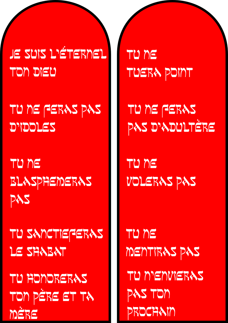 Les Dix Commandements en Français